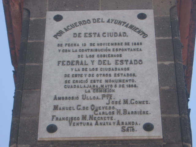 Fotografía propia.